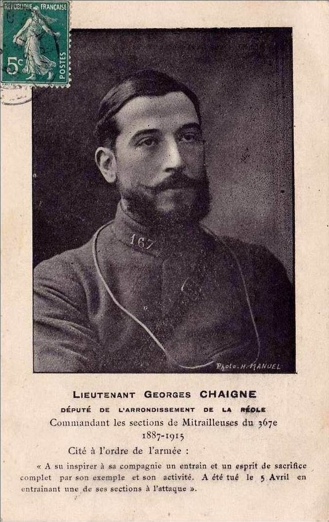 La Réole